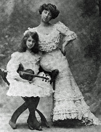 Vivien Chartres (1893-1941) e Annie Vivanti Chartres (1866.1942)